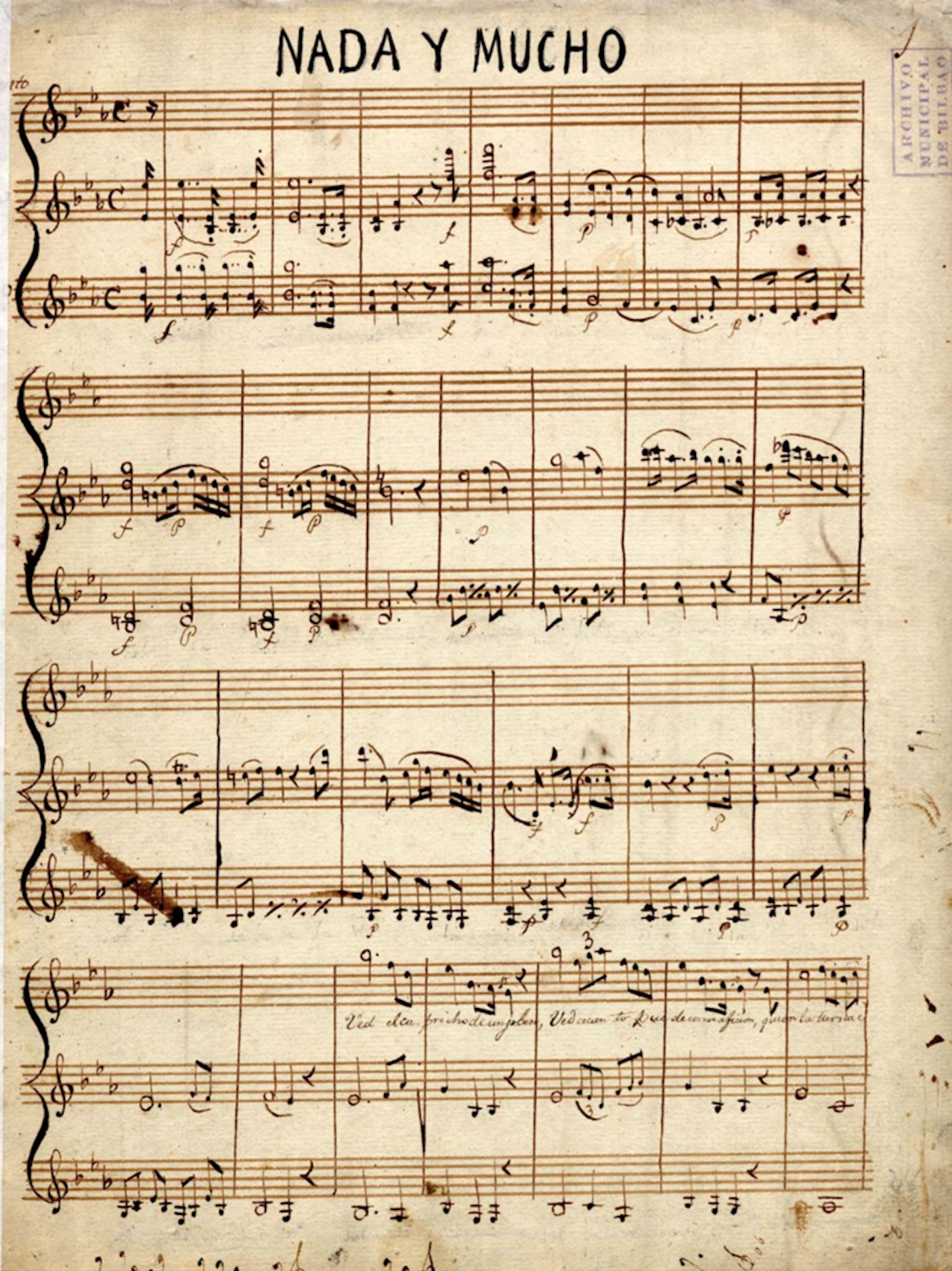 Nada y Mucho, partitura de Juan Crisóstomo de Arriaga de la Biblioteca Municipal de Bilbao.